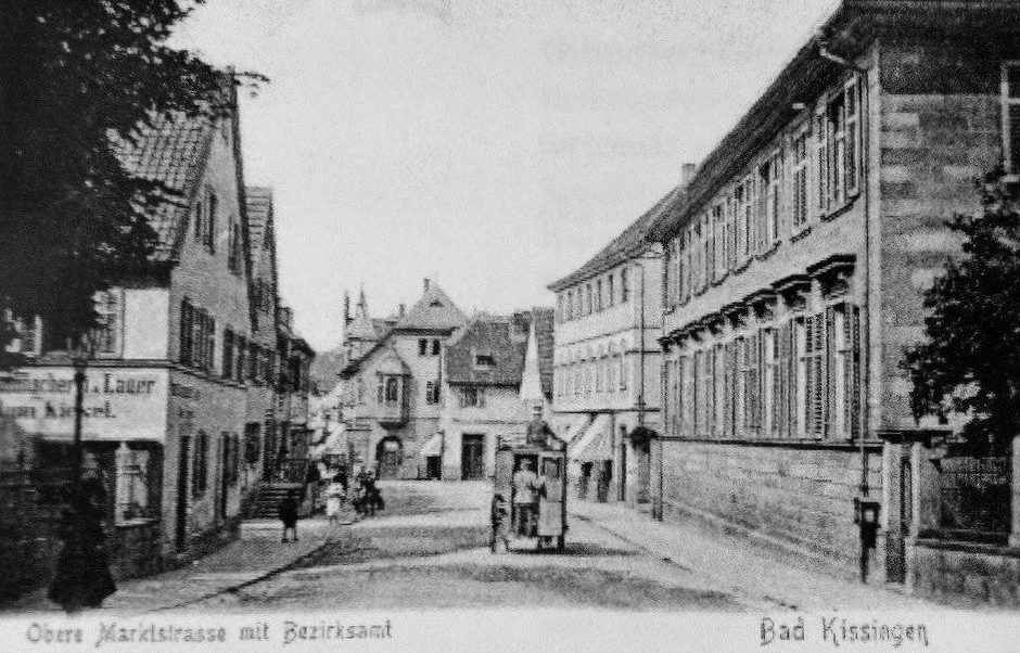 Das frühere Bezirksamt in Bad Kissingen (um 1900)